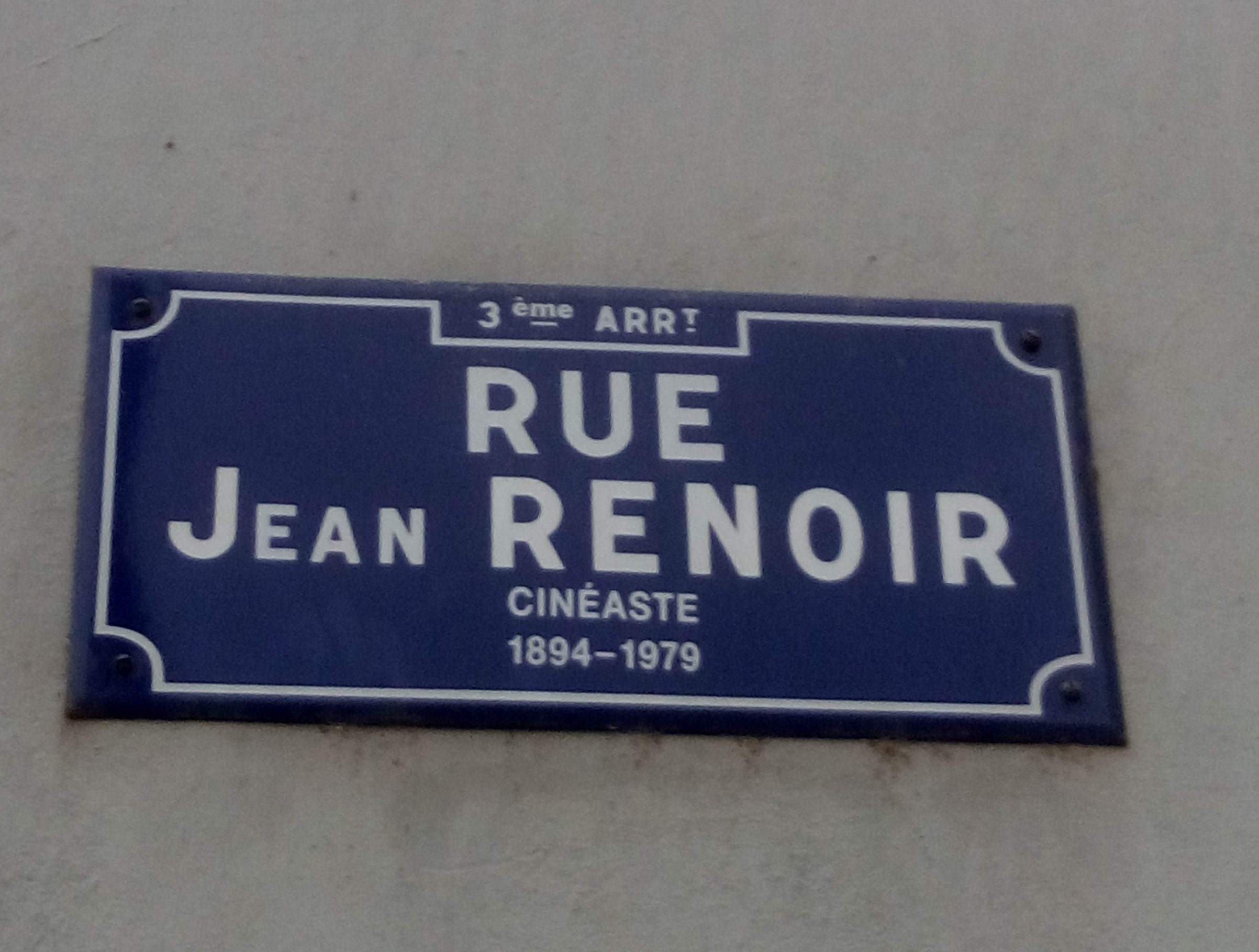 Plaque de la rue Jean-Renoir, dans le 3e arrondissement de Lyon.